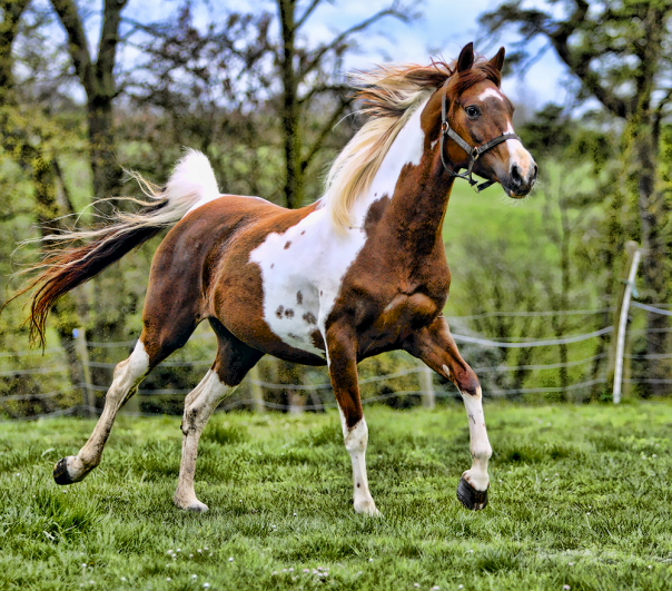 Pintarabian